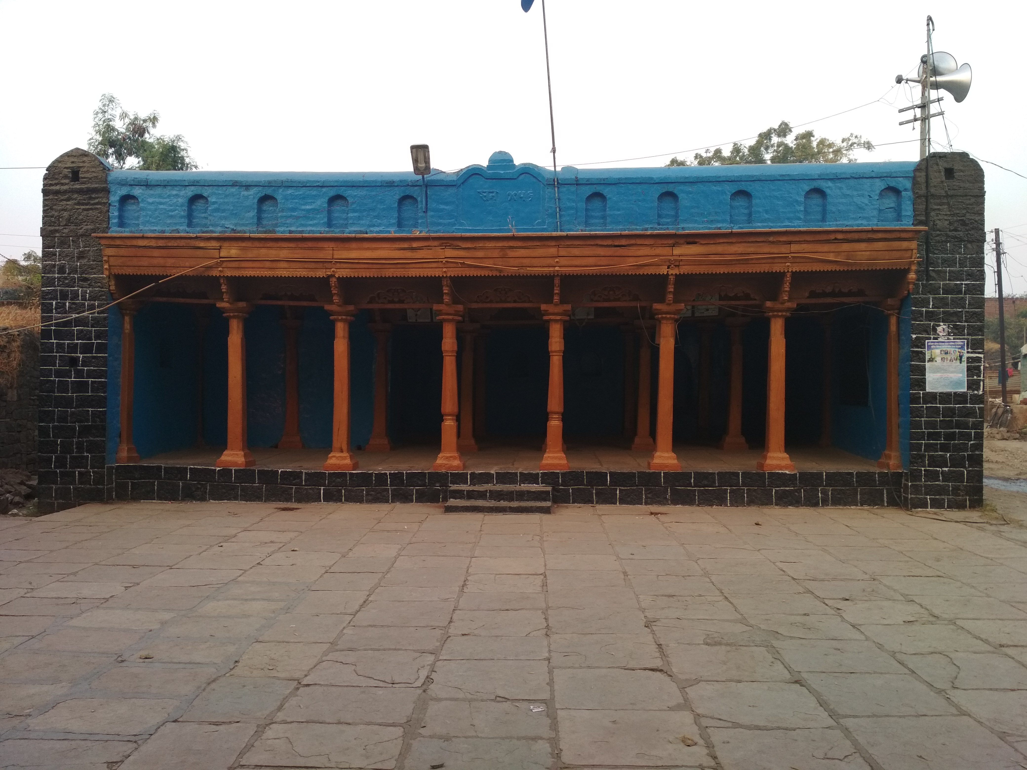 डॉ. बाबासाहेब आंबेडकर यांचा दक्षिण सोलापूर दौरा